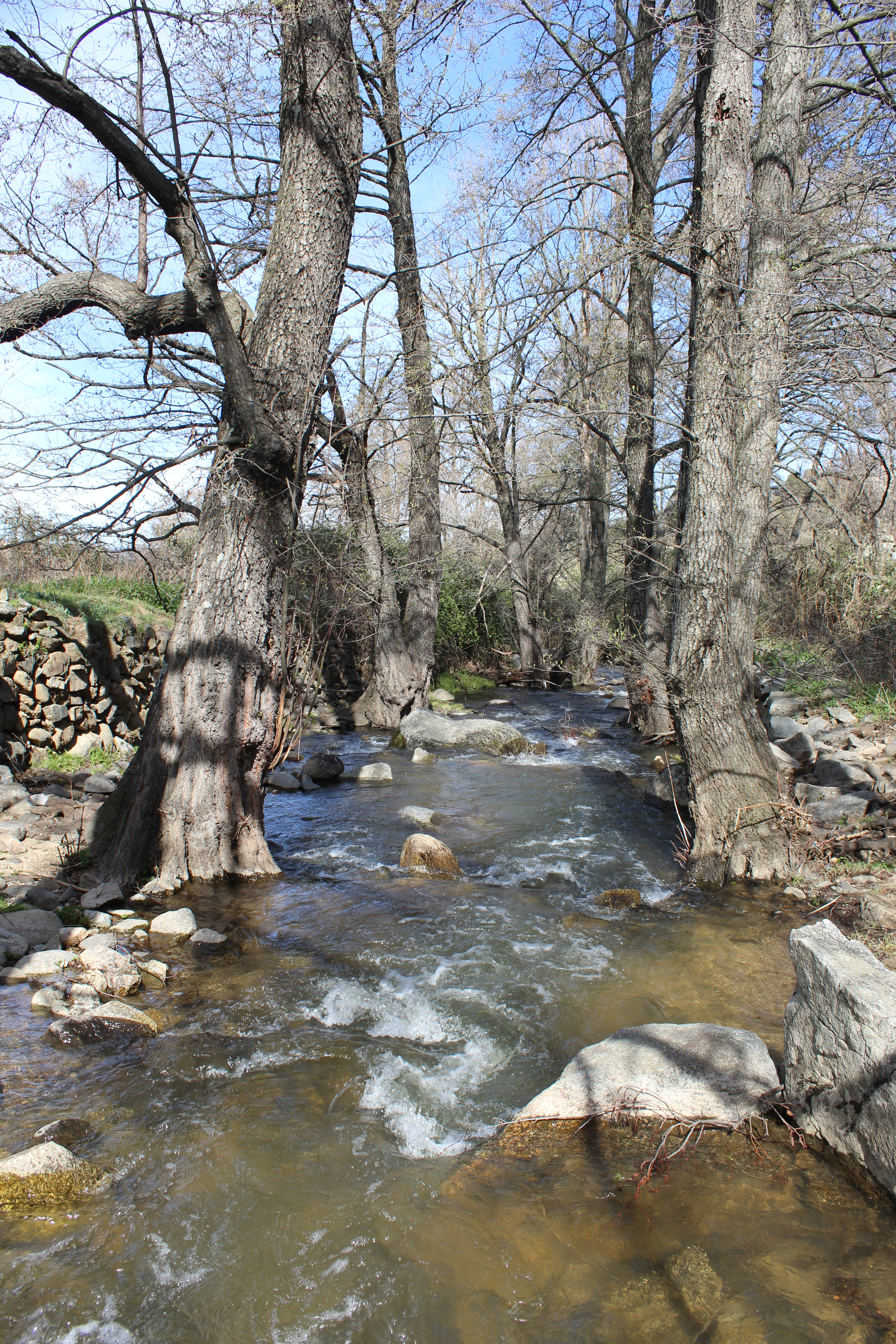 Garganta de la Yedra, El Tiemblo, Provincia de Ávila.